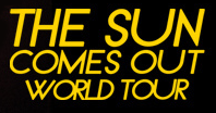 Logo diseñado a partir de la fuente original del segundo poster que promocionó al Sale el Sol World Tour.